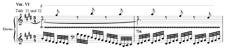 Takt 31 und 32 aus der letzten Variation des dritten Satzes von Beethovens Opus 109